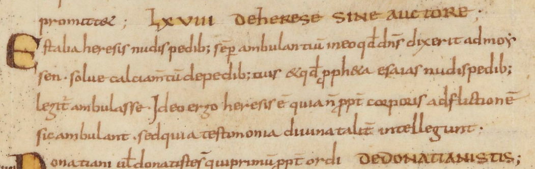 Smaragdus. Augustinus. Alcuinus. et alia opera. Rubriques en onciale et incipits en capitale. Arcatures peintes (2). - F. 1 et 271, essais de plume dans la marge. — Lacune entre les ff. 234 et 235. - Parchemin. - 273 ff. à 2 colonnes. - 365 × 275 mm. - Reliure XVIIIe s. maroquin rouge aux armes royales. Provient de la bibliothèque du chapitre du Puy , cf. Delisle, Cab. des mss ., I, 511 ; Lindsay, Notae lat ., 472. Ce manuscrit a appartenu à Colbert.